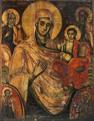 „Света Богородица с Христос и други светители“, църква „Света Богородица“, Тетово. 1873 година. Автор Аврам Дичов от с. Тресонче. Размери: 41,5 Х 32 Х 3 cm.